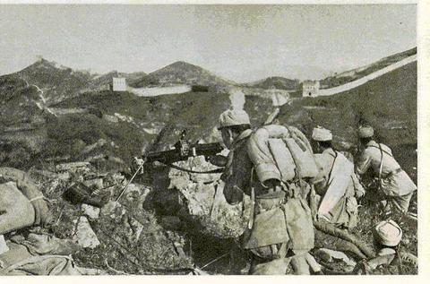 1942年冀东八路军在古长城喜峰口大战日军